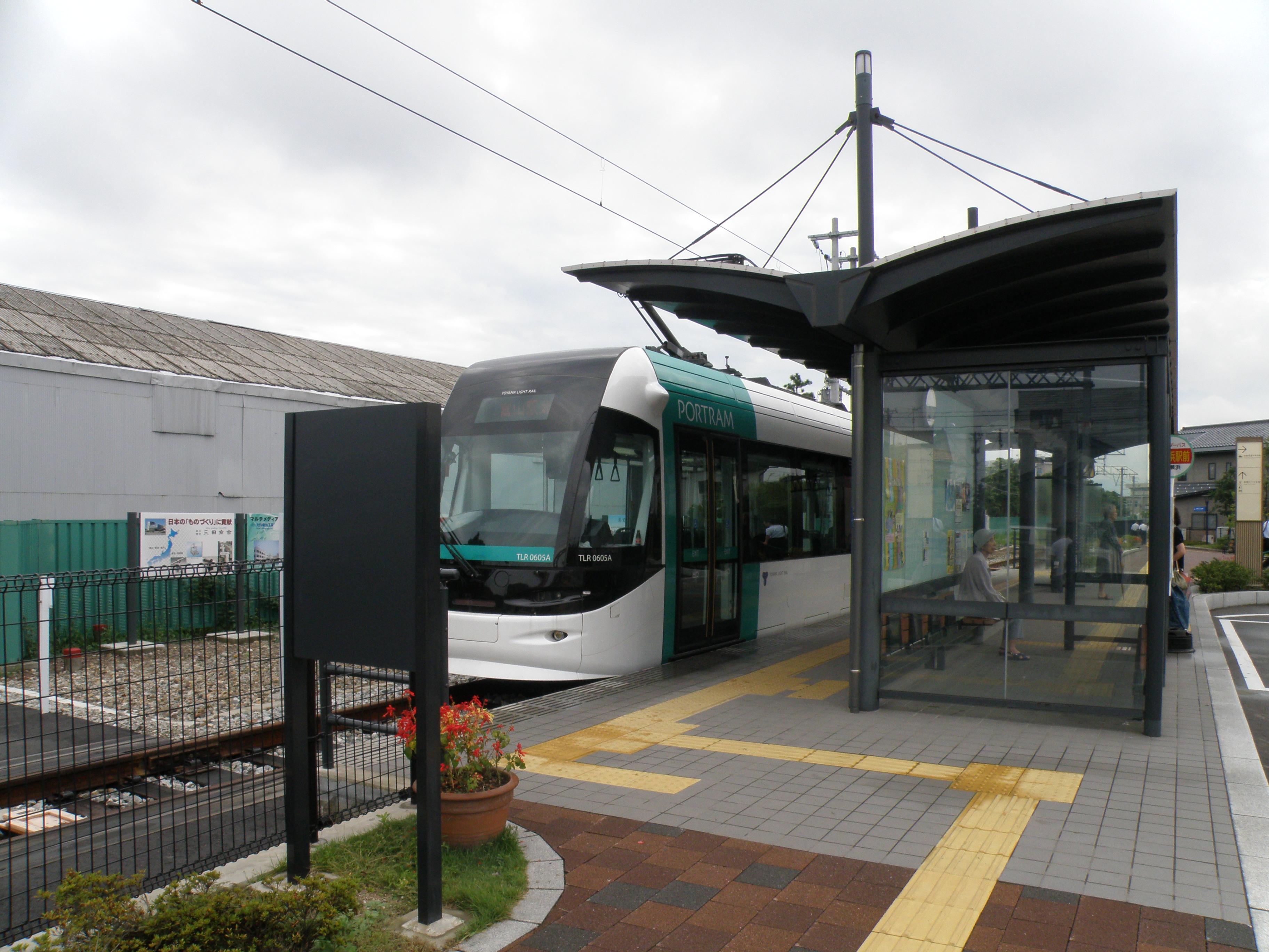 岩瀬浜電停